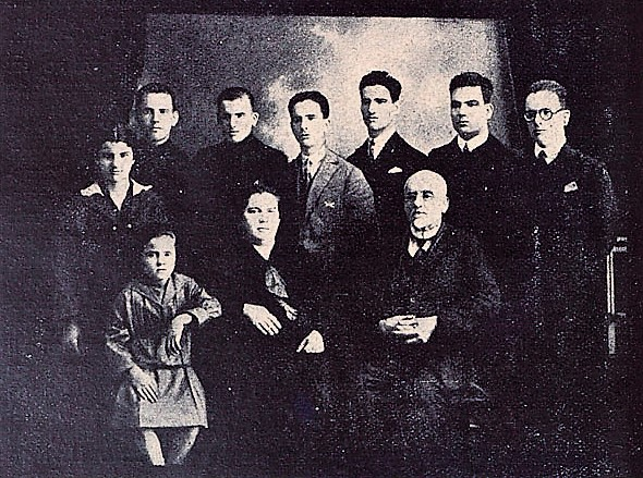 Семейството на д-р Стефан Гунчев и Велика Хр. К. Конкилева. От дясно наляво: Гунчо, Христо, Иван, Колю, Здравко, Цоню, Донка, Анастасия (седналата).